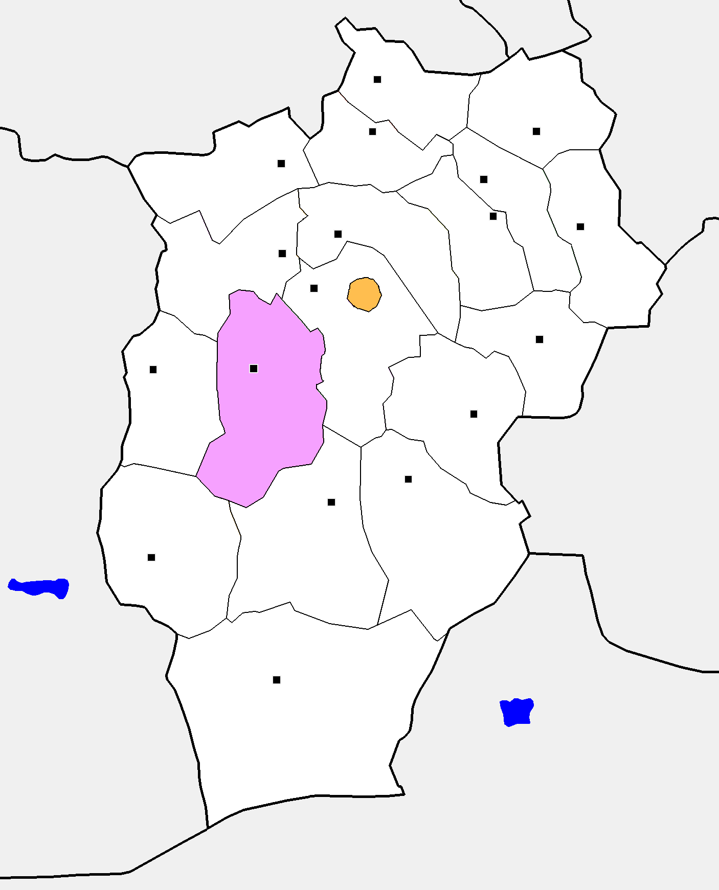 Монгол: Өвөрхангай аймгийн Хайрхандулаан сумын байршил